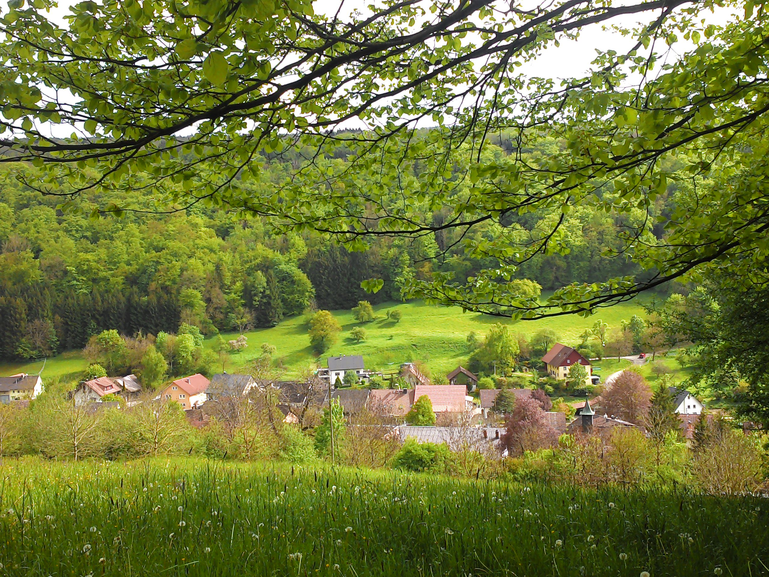 Die Ortschaft Küßnach der Gemeinde Küssaberg im Landkreis Waldshut in Baden-Württemberg, Deutschland.